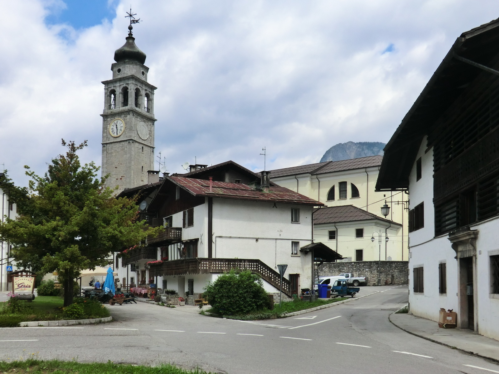 Forni di Sopra, Friuli-Venezia Giulia, Italy